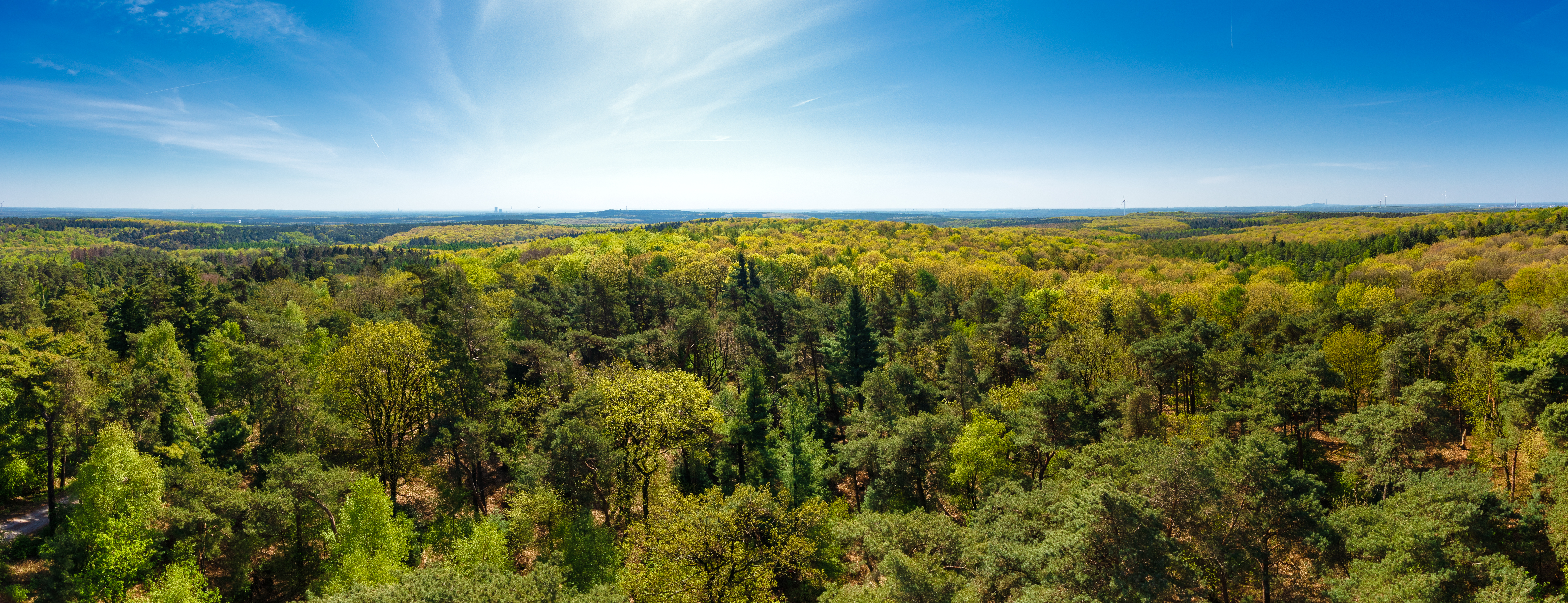 Panorama der Haard im Naturpark Hohe Mark-Westmünsterland